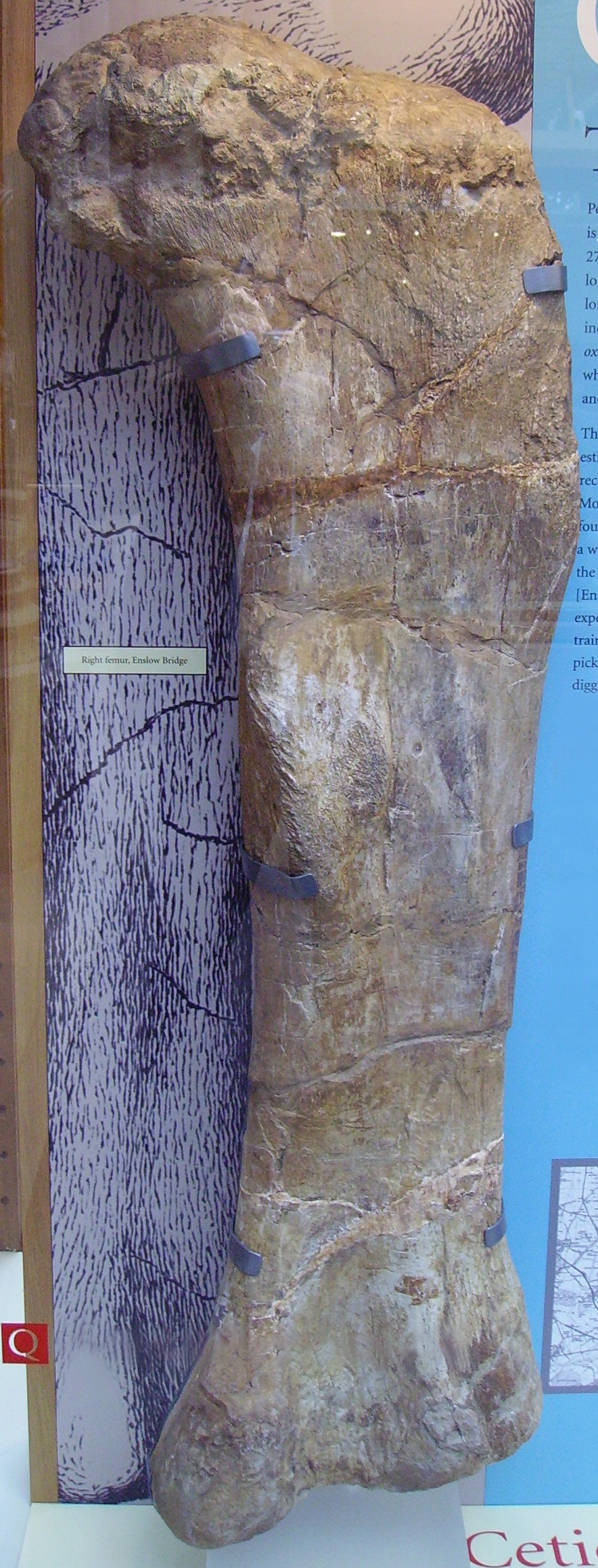 Cetiosaurus right femur